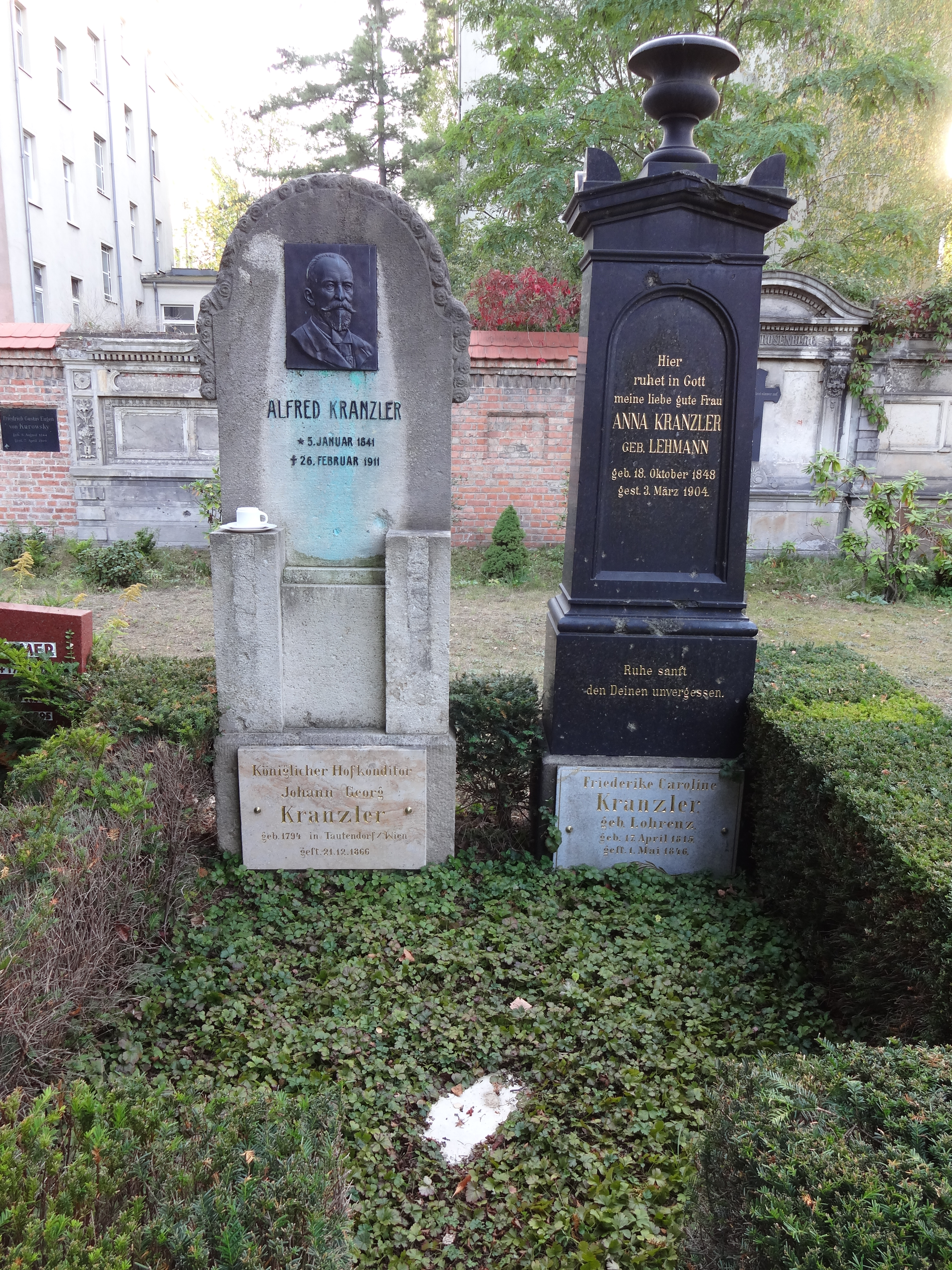 Grab von Alfred und Johann Georg Kranzler auf dem Dorotheenstädtischen Friedhof II in der Liesenstraße in Berlin